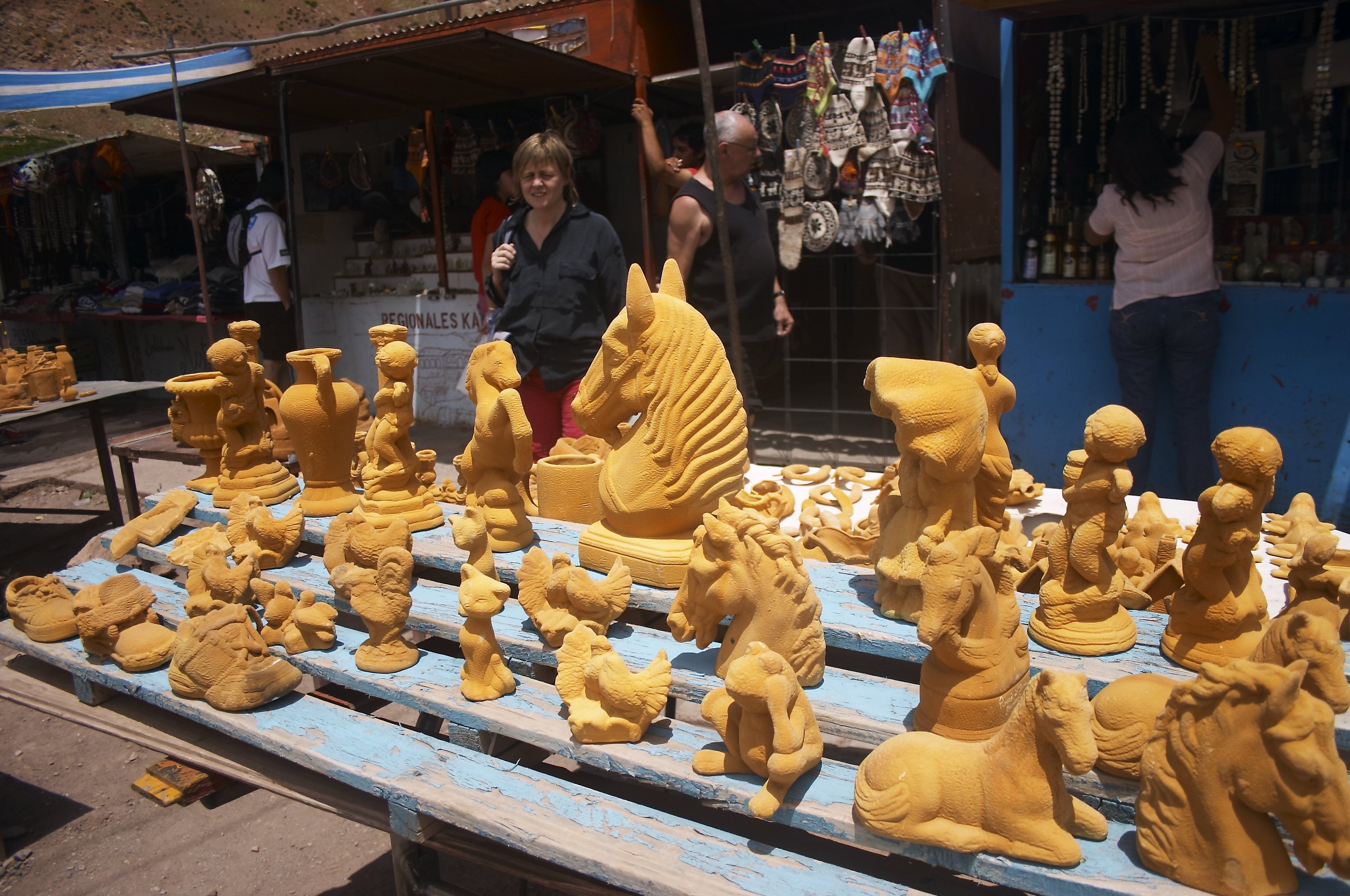 El alto contenido de azufre de las aguas de Puente del Inca recubren a un objeto de azufre si éste se deja un tiempo en las mismas. Esos objetos se venden como artesanías a los turistas, como las piezaz que se ven en la fotografía. Provincia de Mendoza, Argentina.